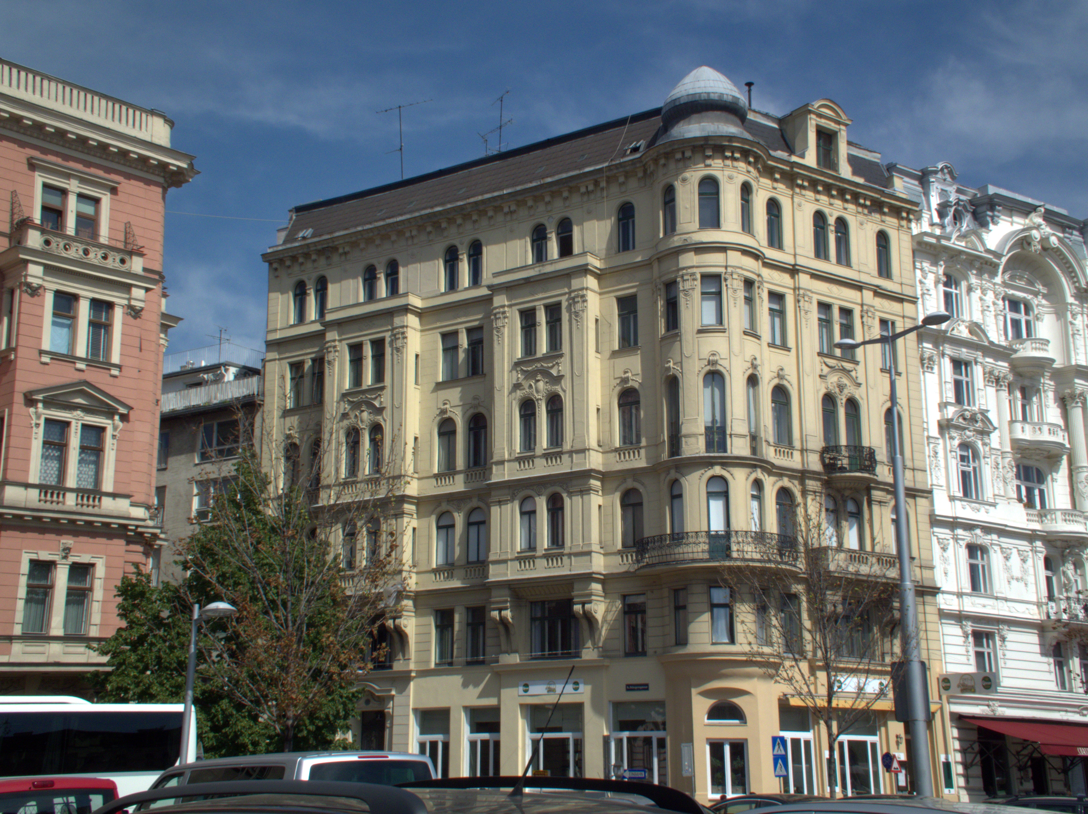 Wien Stadtteil Mariahilf, Linke Wienzeile 44